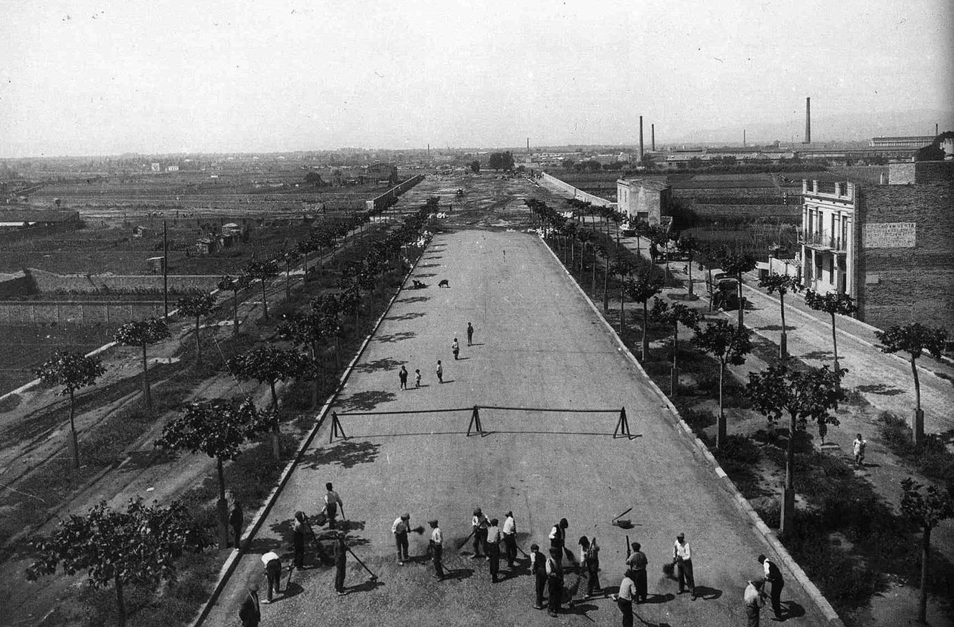 Apertura de la Gran Vía (1928).